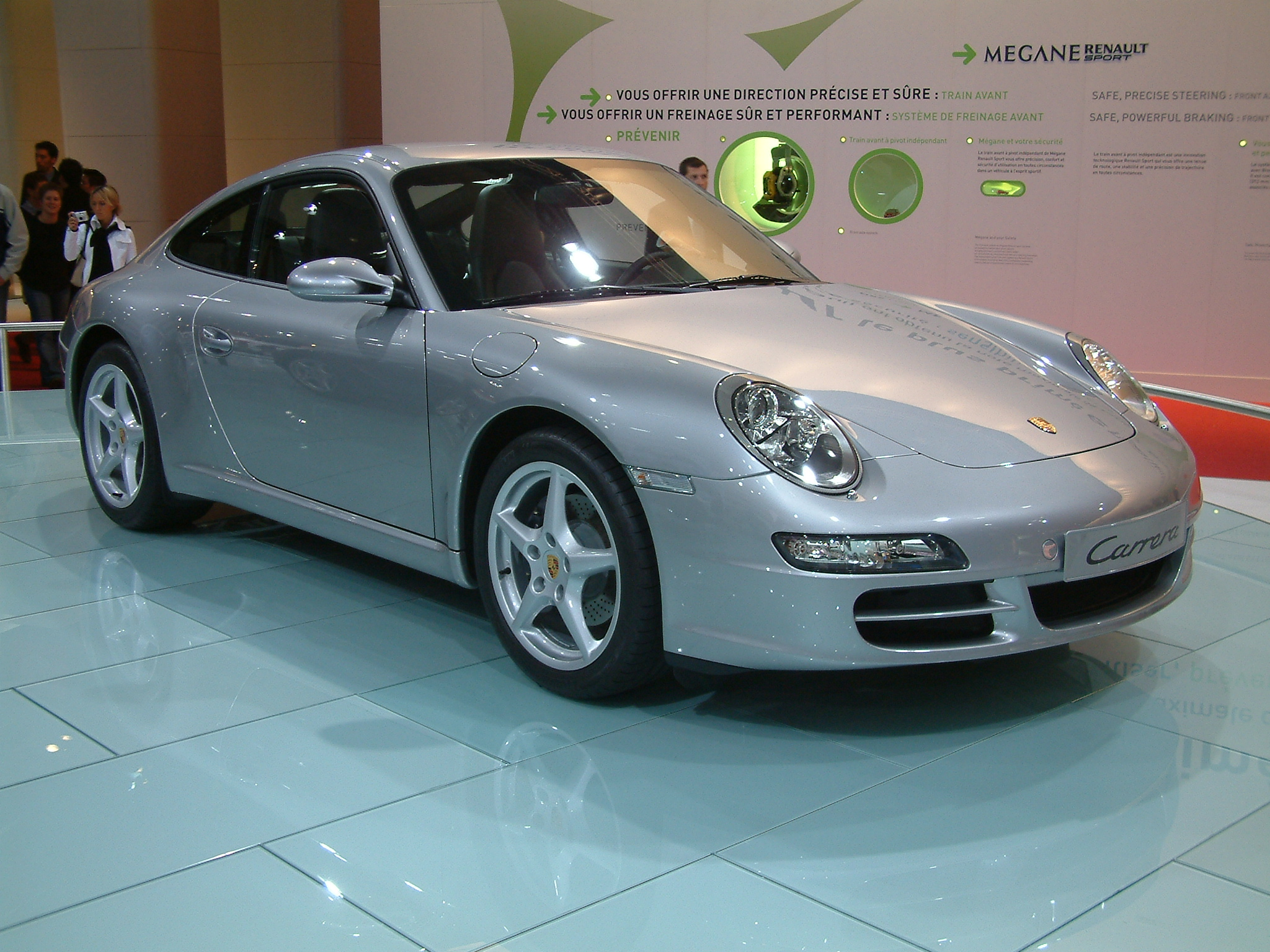 2004 silver Porsche 911 Carrera type 997Porsche Carrera